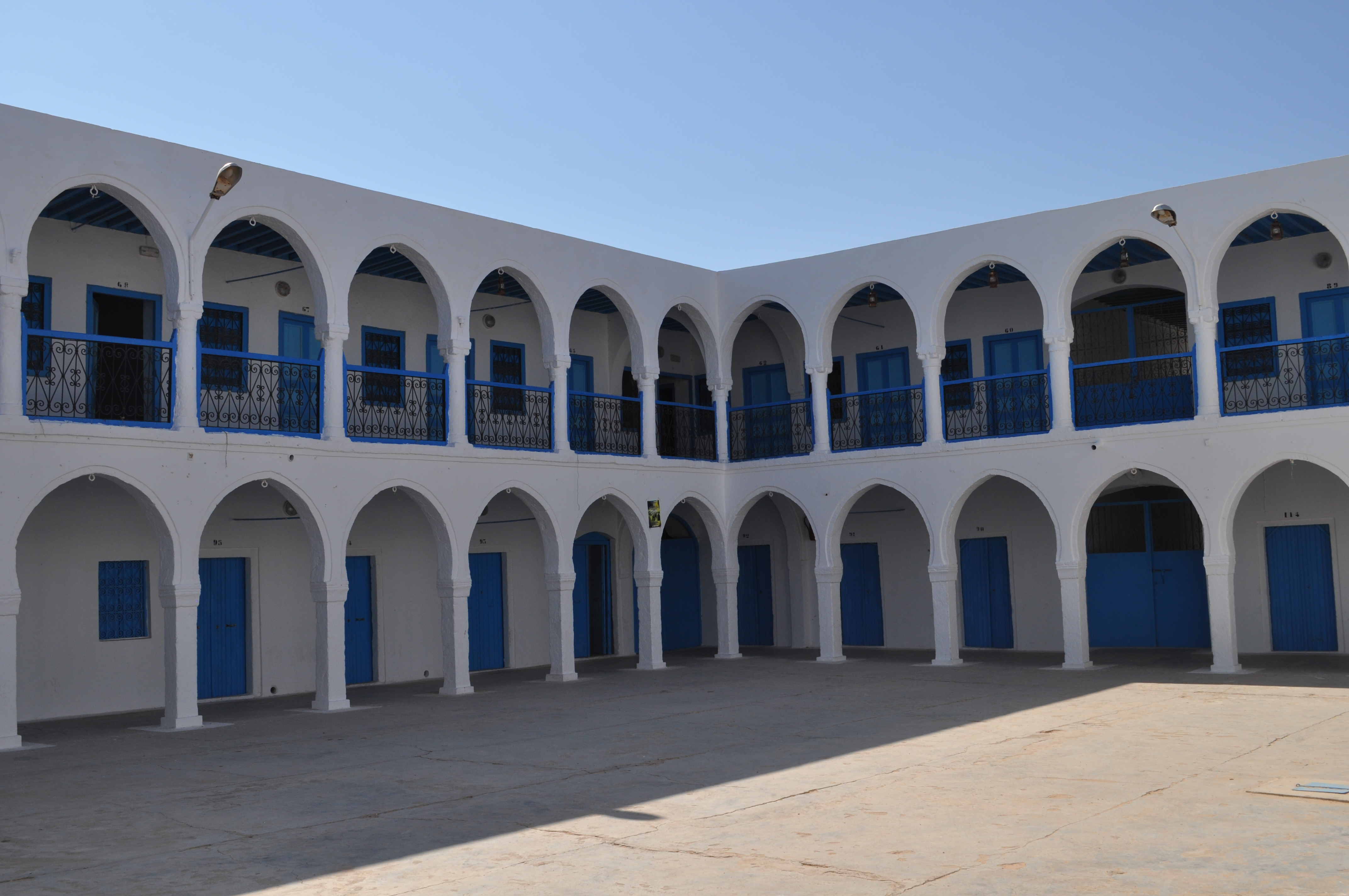 Synagogue de la Hara-Srira